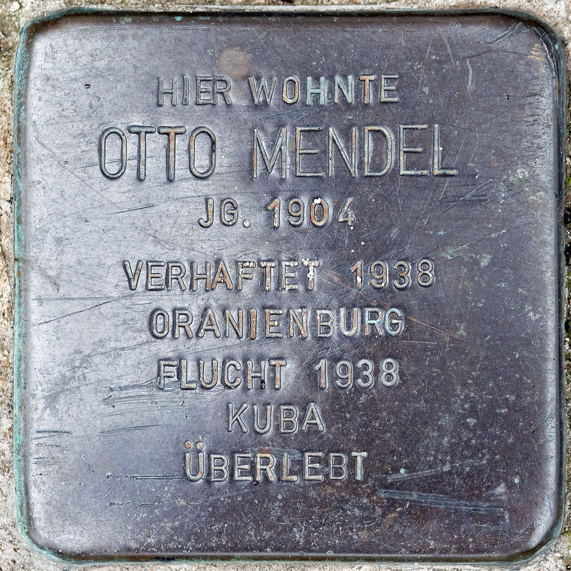 2017 07 16 Stolpersteine Kerken Mendel Otto